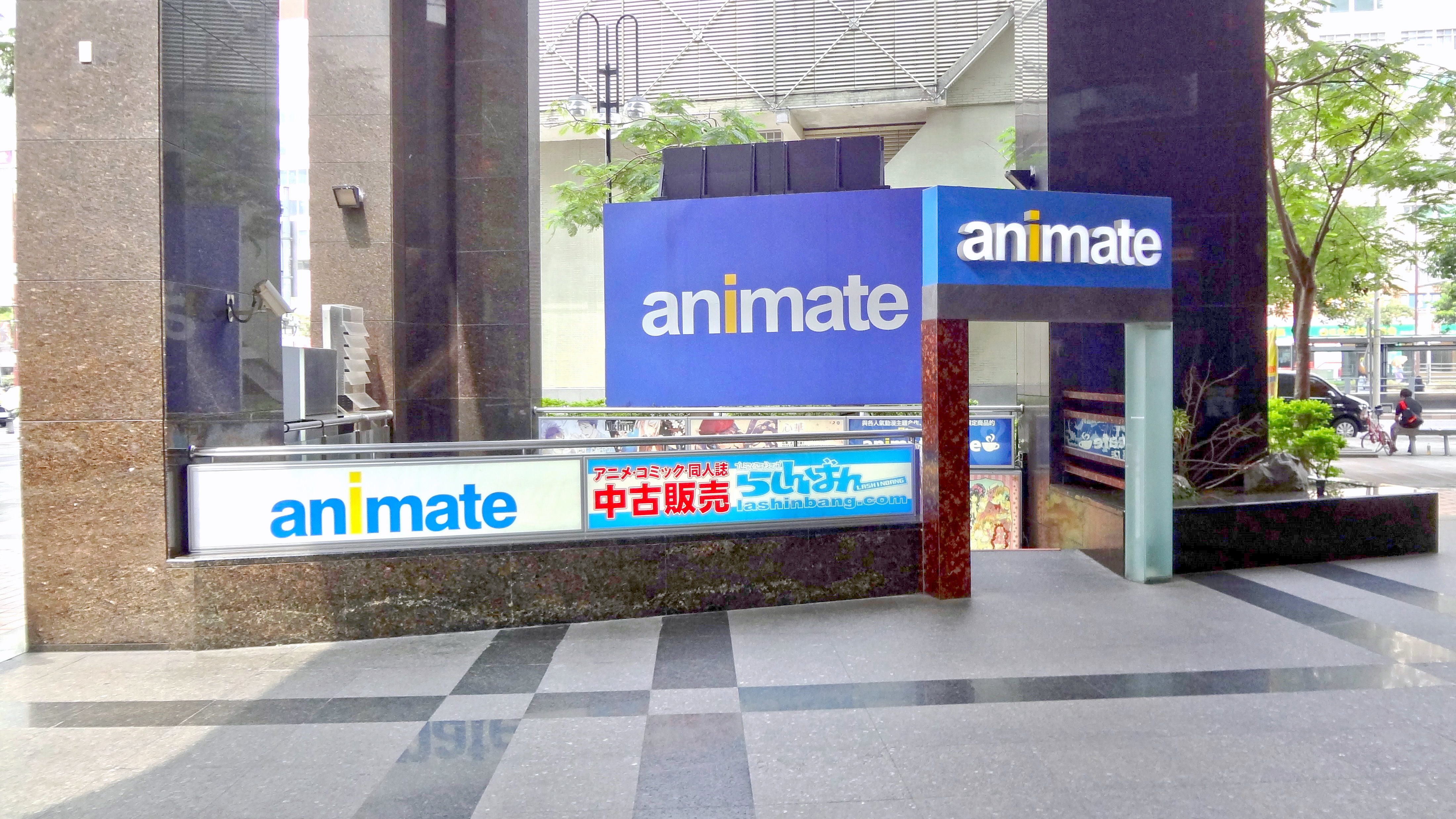 安利美特台北總店，欄杆設置安利美特與日本中古動漫畫周邊商品專賣店指南針（Lashinbang）招牌。